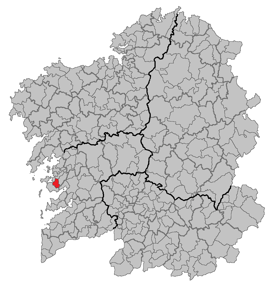 Mapa coa localización do concello de Meaño.